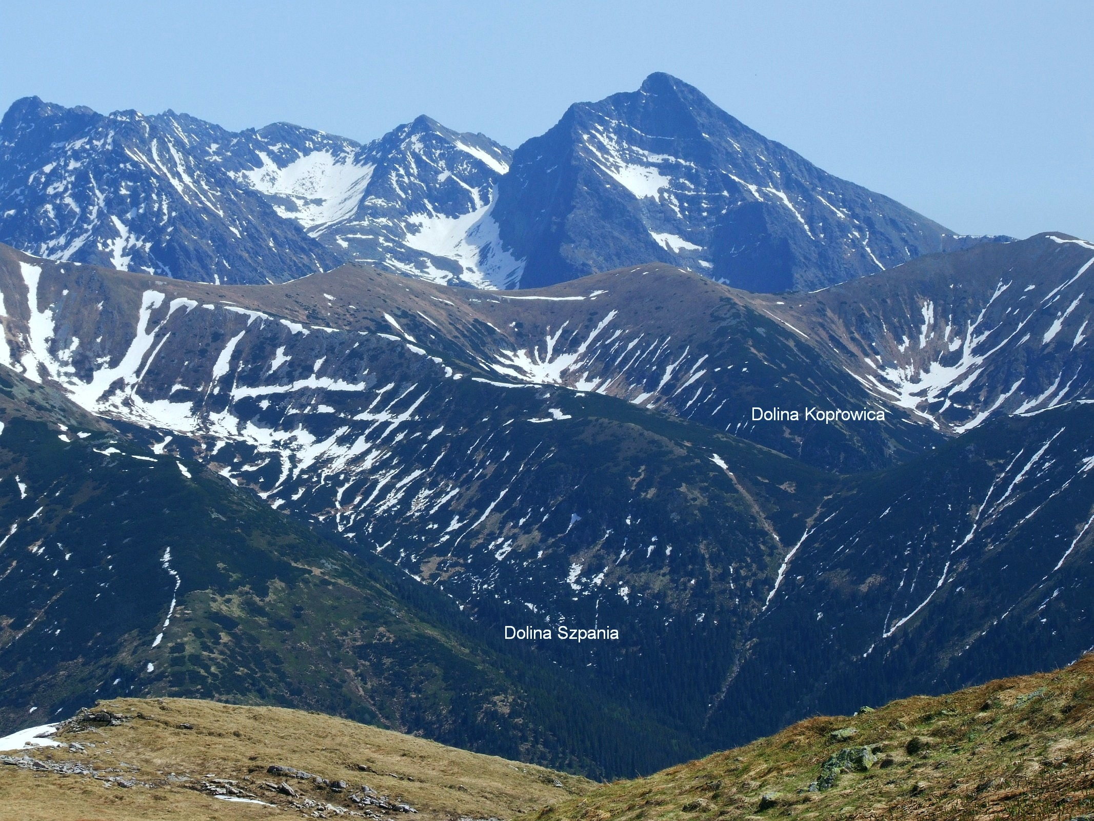 Widok na Tatry Wysokie z Małołączniaka. Najwyższy szczyt to Krywań